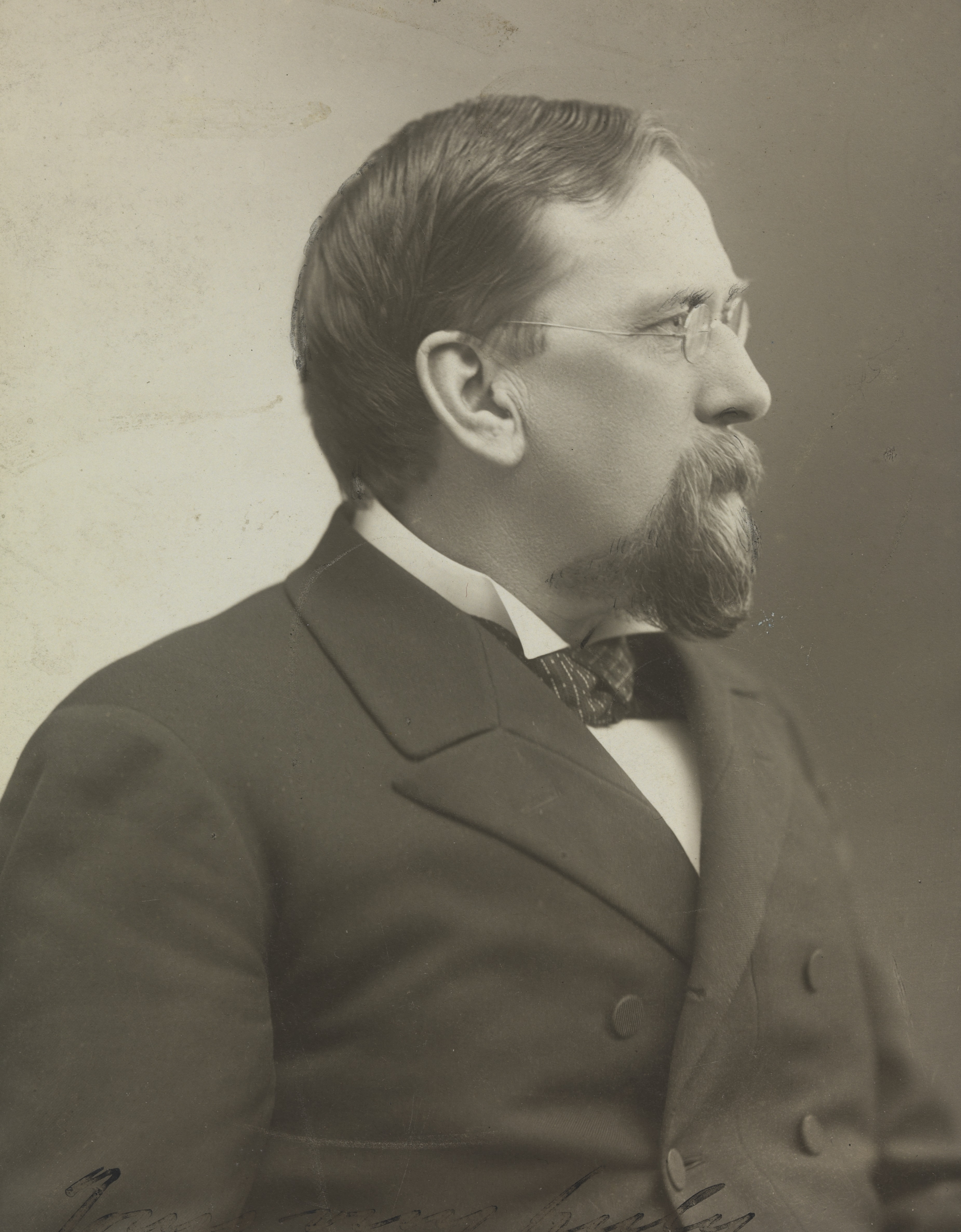 H.A. Haugan Med dedikasjon. Depicted person: Haugan, H. A. Depicted place: USA, Chicago